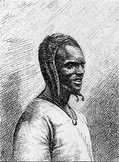 Chef khassonkais (illustration de Côte occidentale d'Afrique du Colonel Frey) Fig. 53 p. 91